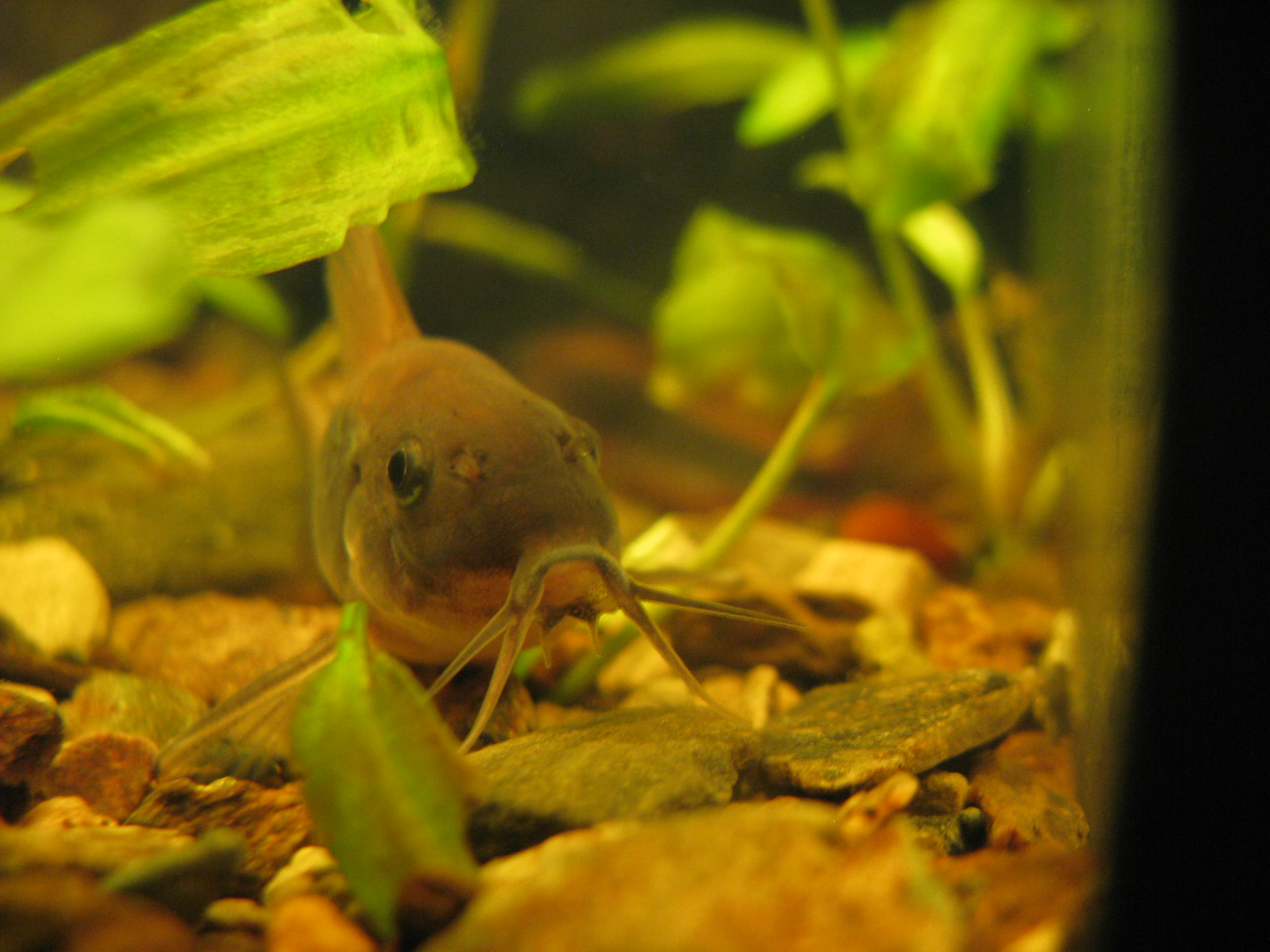 Pancéřníček zelená - detail tlamky